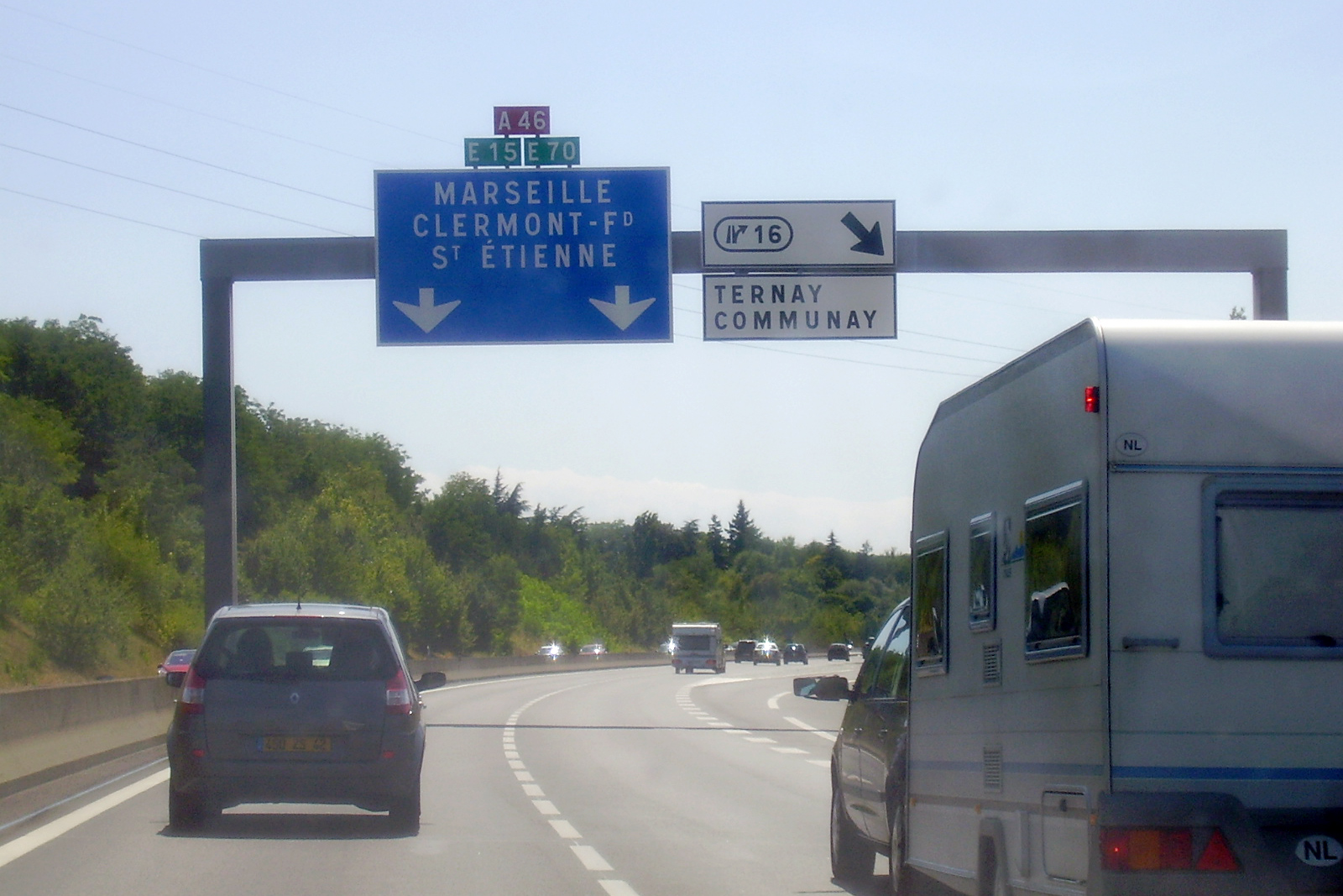 A46 - Sortie 16 vers Givors et l'A47 (Saint-Étienne, Clermont-Ferrand) ou l'A7 (Vienne, Marseille).